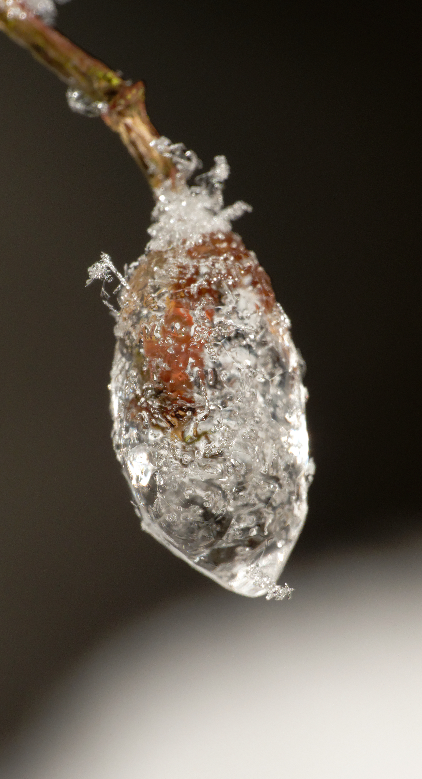 Glace sur un bourgeon. Image prise avec la bonnette Raynox DCR-250.